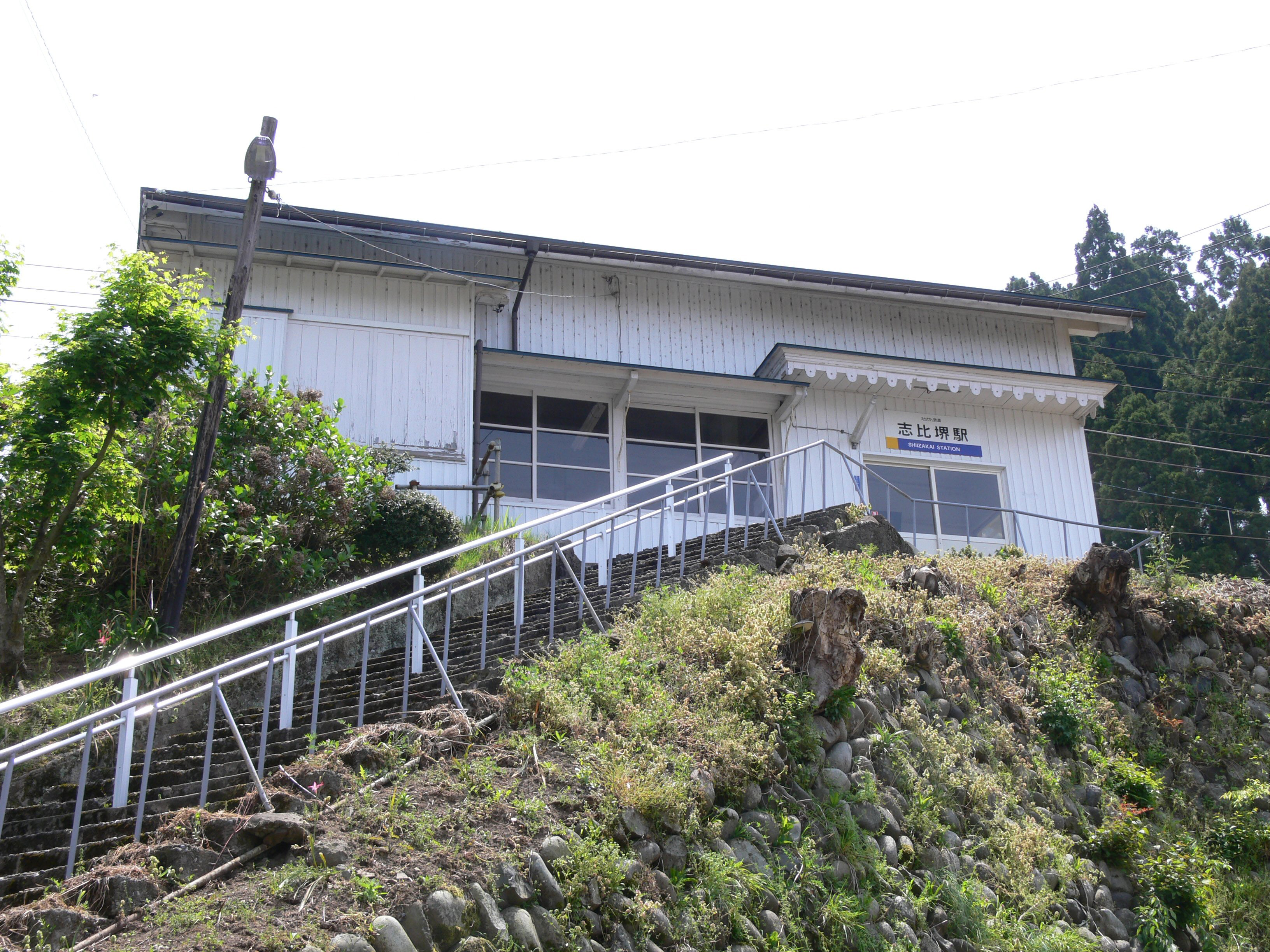 志比堺駅 Shiizakai Station